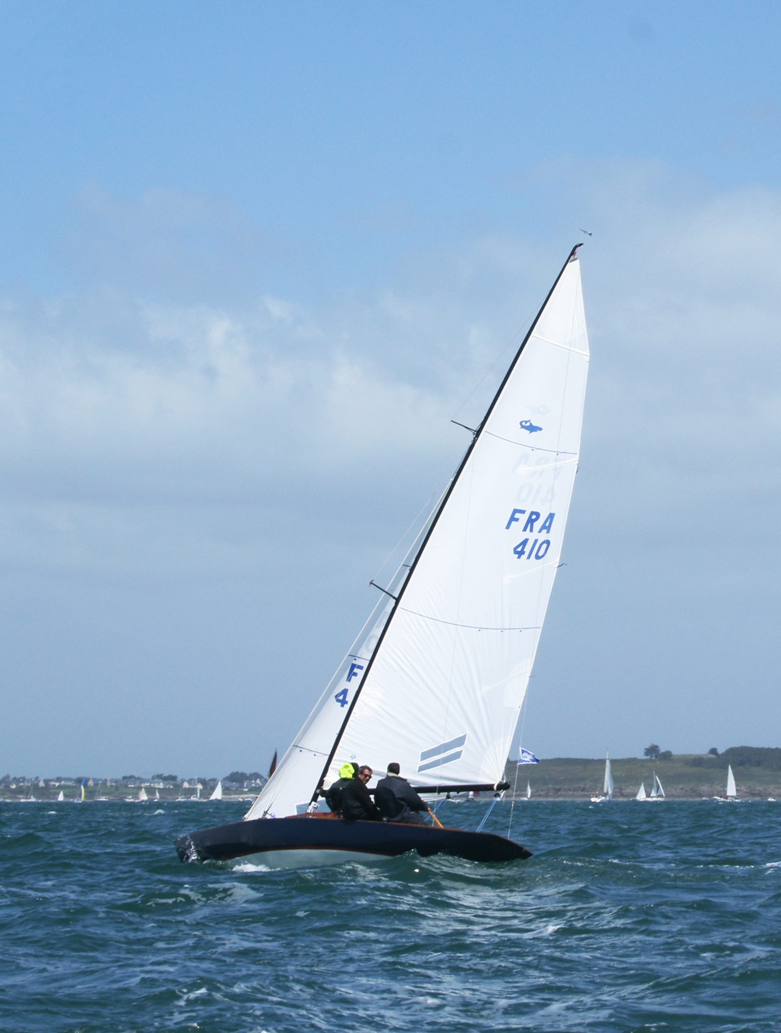 Requin